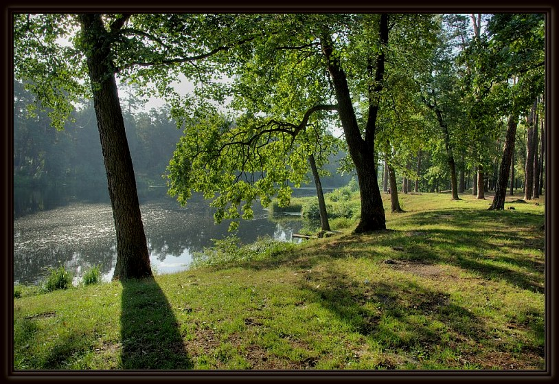 фото озера Горащиха